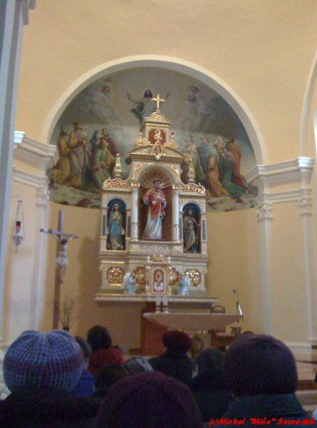 Oltár v kostole Sv. Štefana, Kamenica nad Cirochou